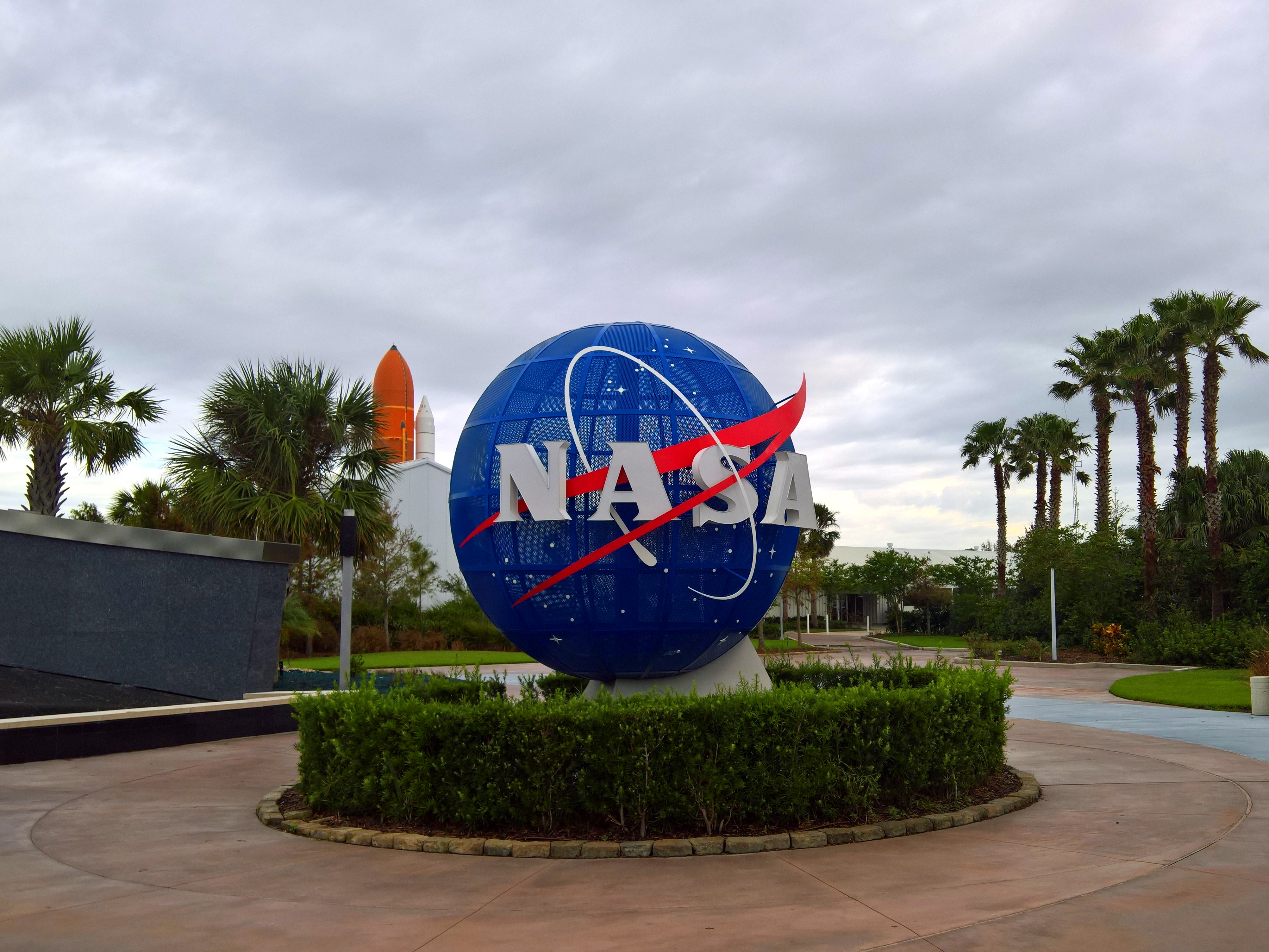 Eingangsbereich des Kennedy Space Center Visitor Complex, im Hintergrund Atlantis Exhibit building